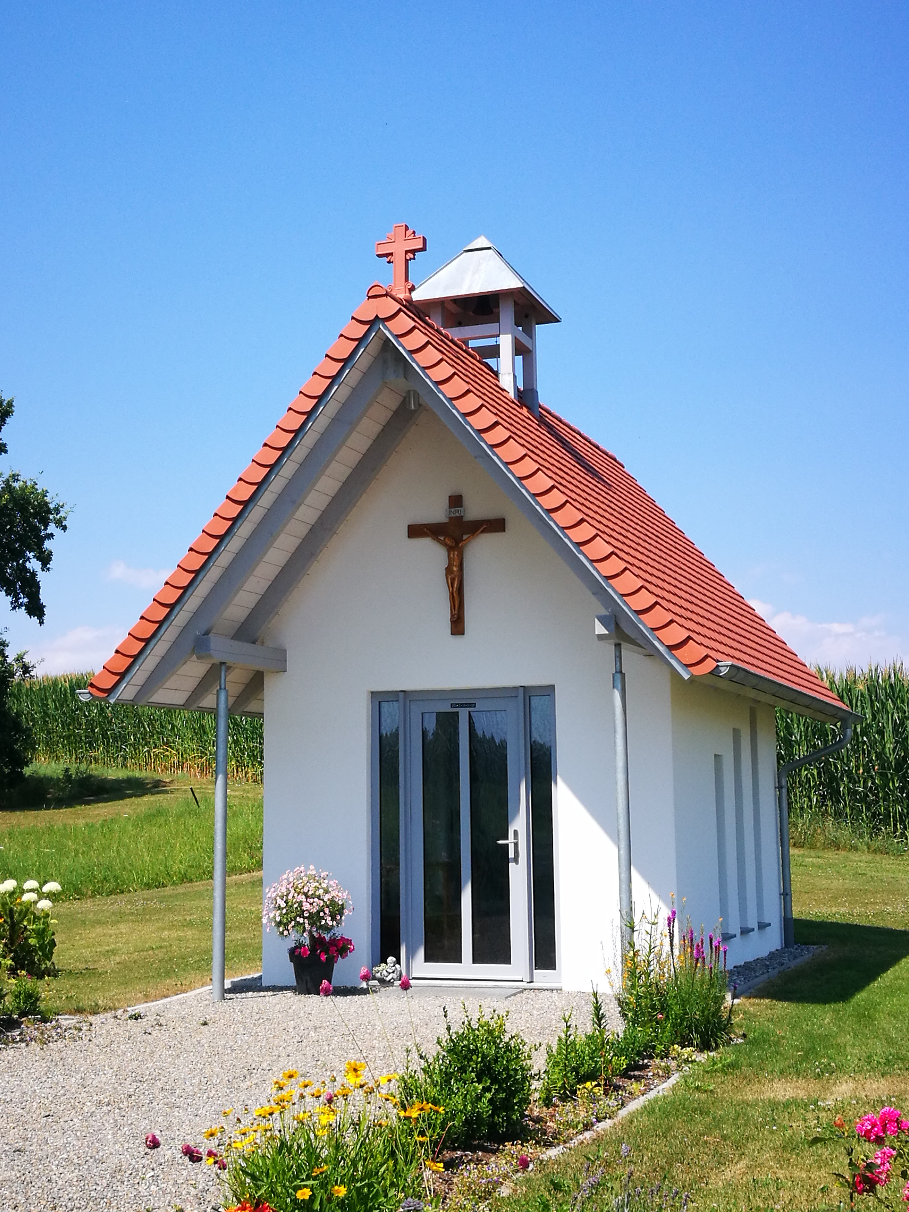 Deutschland (D) - Baden-Württemberg (BW) - Landkreis Sigmaringen (SIG) - Ostrach - Levertsweiler: Marienkapelle am Habsthaler Jakobsweg Richtung Pfullendorf